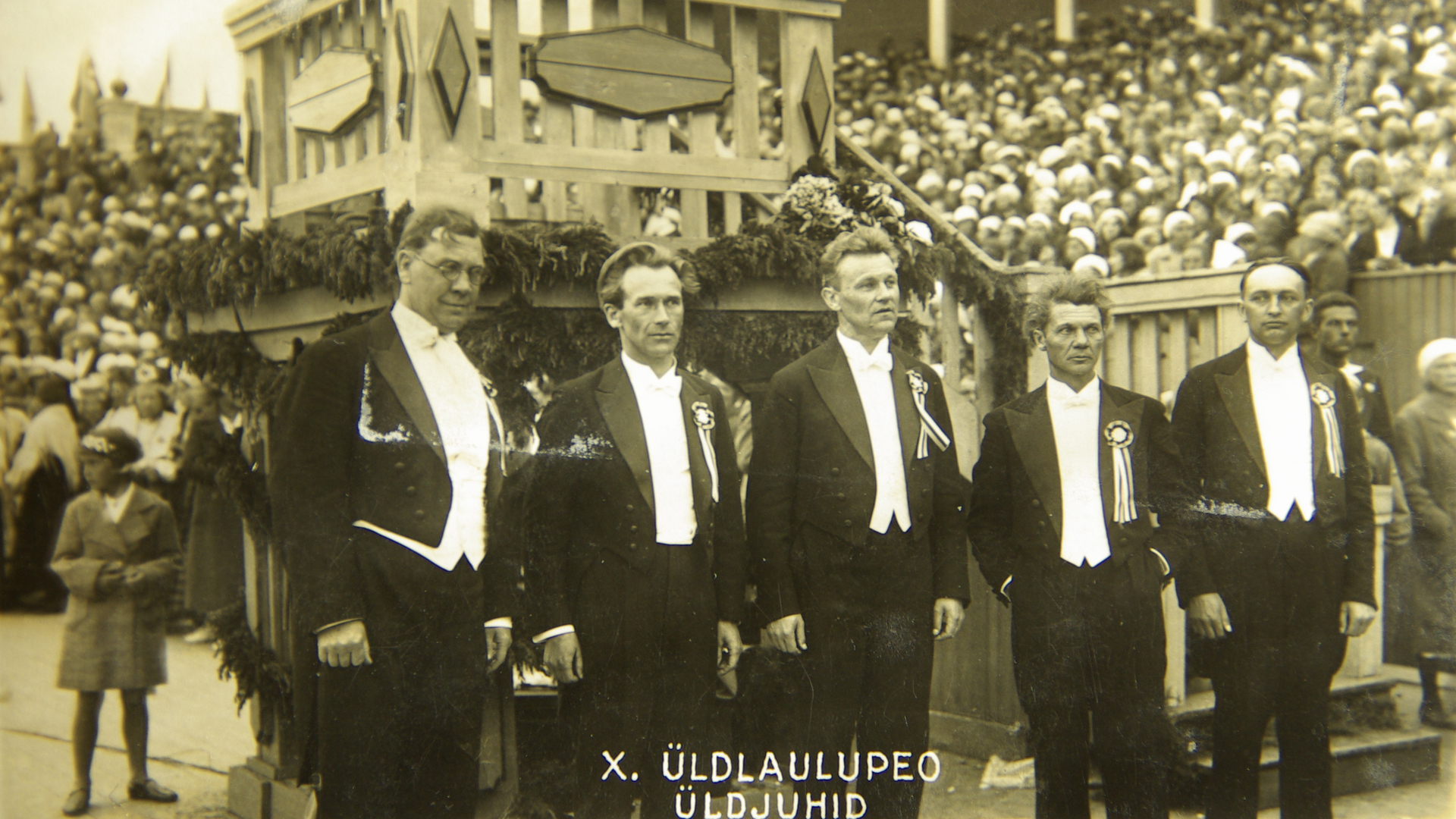 X Üldlaulupeo üldjuhid